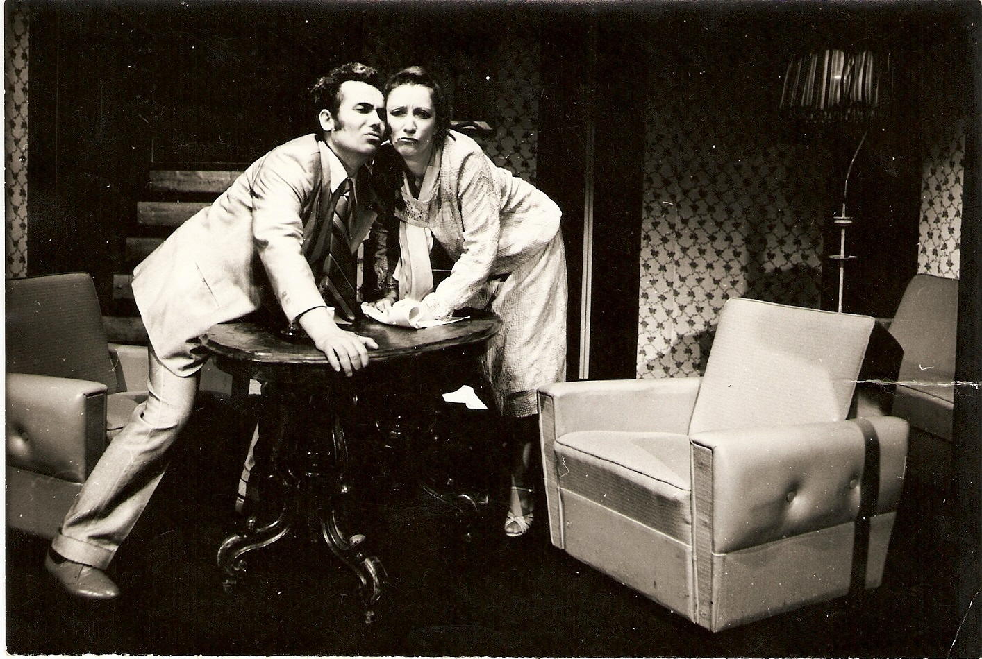 Molnár Gizella Visky Árpáddal Csíky László - Nagypapa látni akar benneteket című előadásában, a Tamási Áron színházban, Sepsiszentgyörgyön.